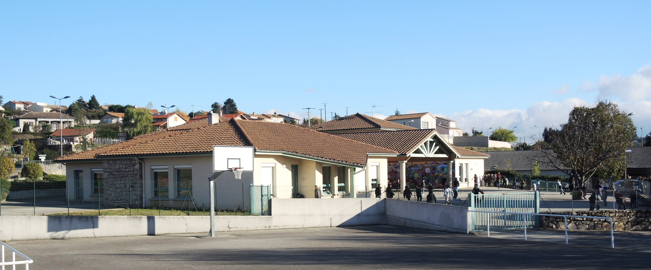 Saint-Clair (Ardèche) école